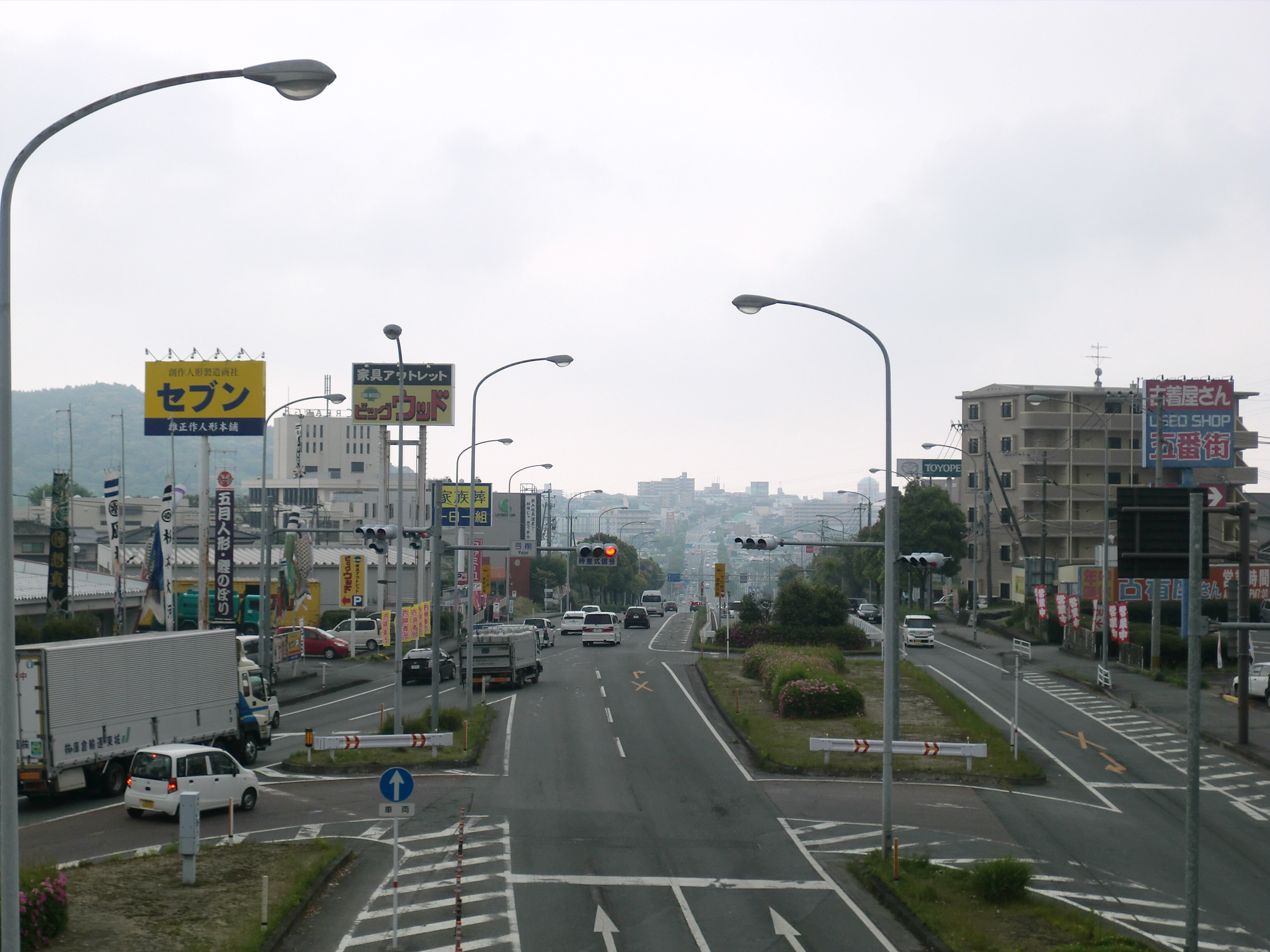 熊本市北区にある国道57号線弓削交差点から白川方向を見る